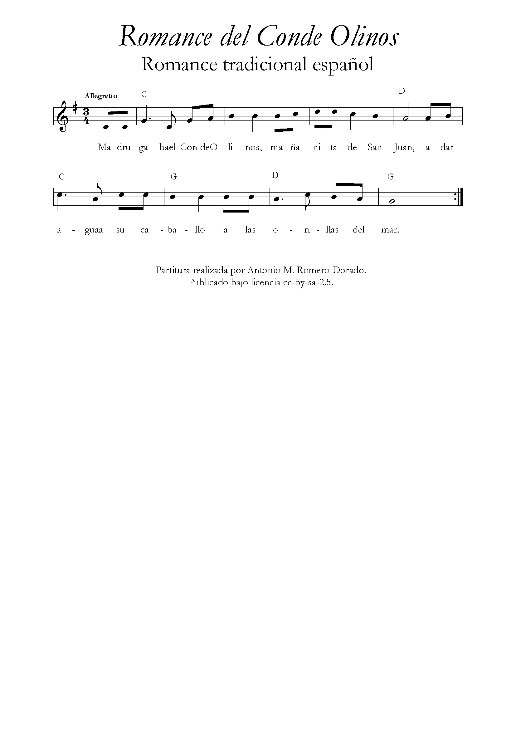 Romance del Conde Olinos (partitura) / Spanish Romance